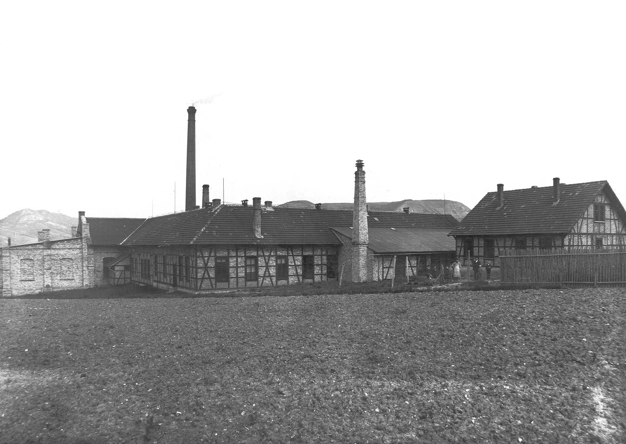 GlastechnischesLaboratorium